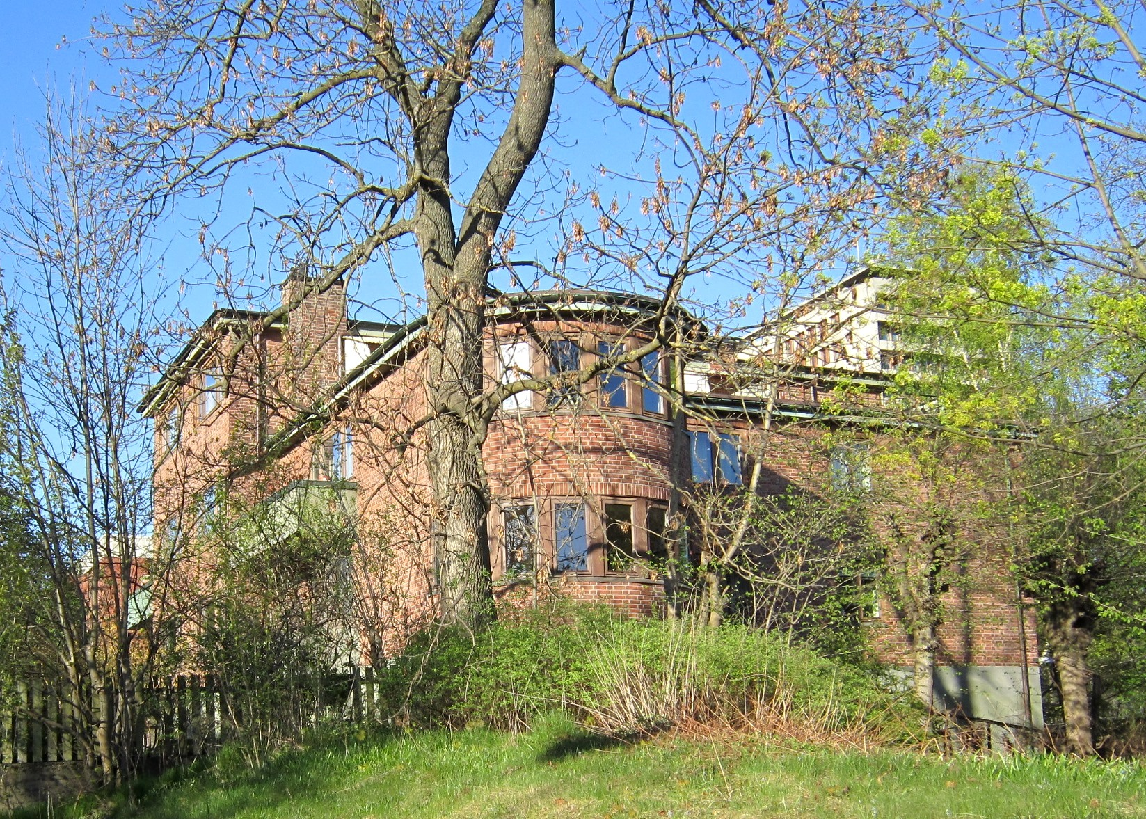 Niels Juels gate 15